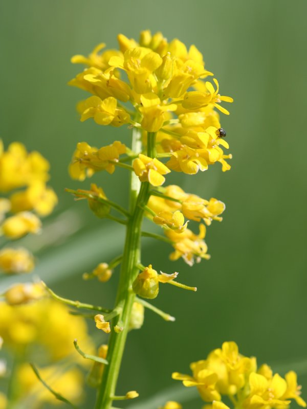 Gewöhnliches Barbarakraut (Barbarea vulgaris)